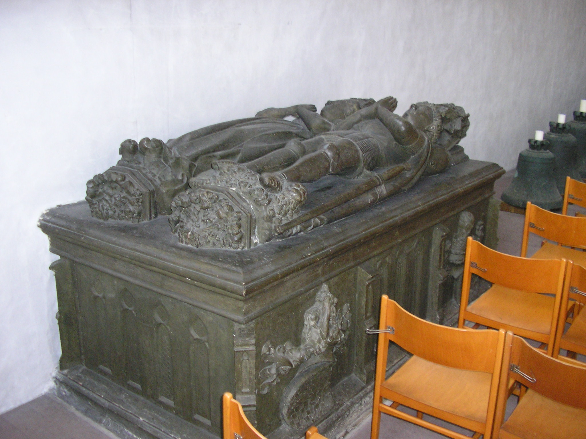 Marienkirche, Grabmal Wilhelms von Berg und seiner Frau Adelheid von Tecklenburg.